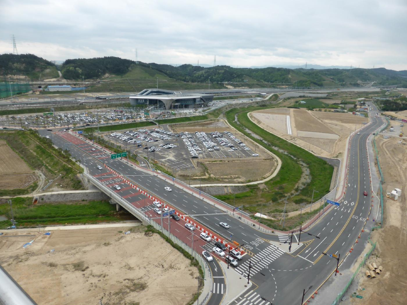 浦項駅全景